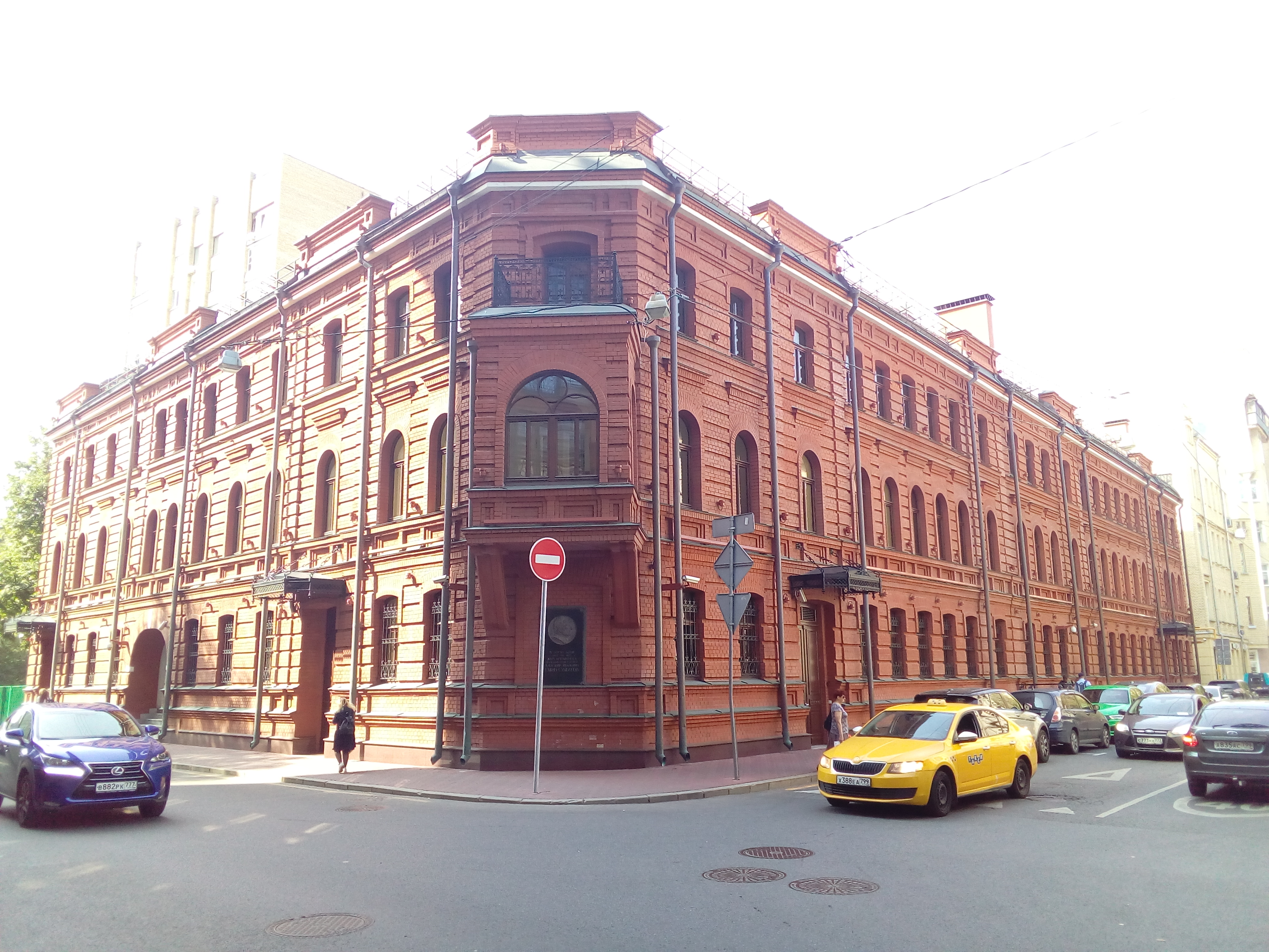 Здание бизнес-центра на Большом Палашёвском переулке, 5/1. 4 сентября 2018г.